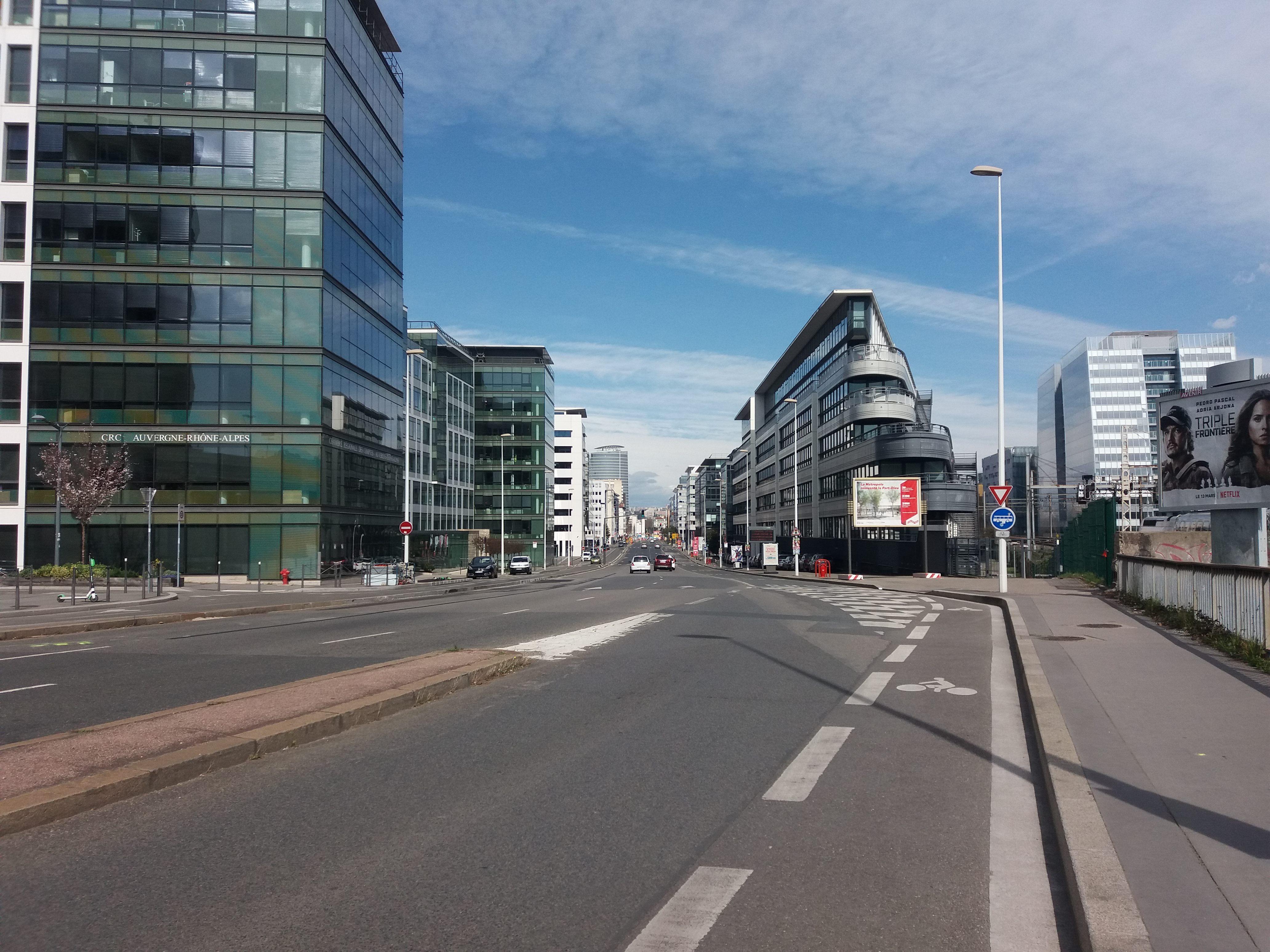 Côté nord au niveau de la rue de l'Abbé Boisard.